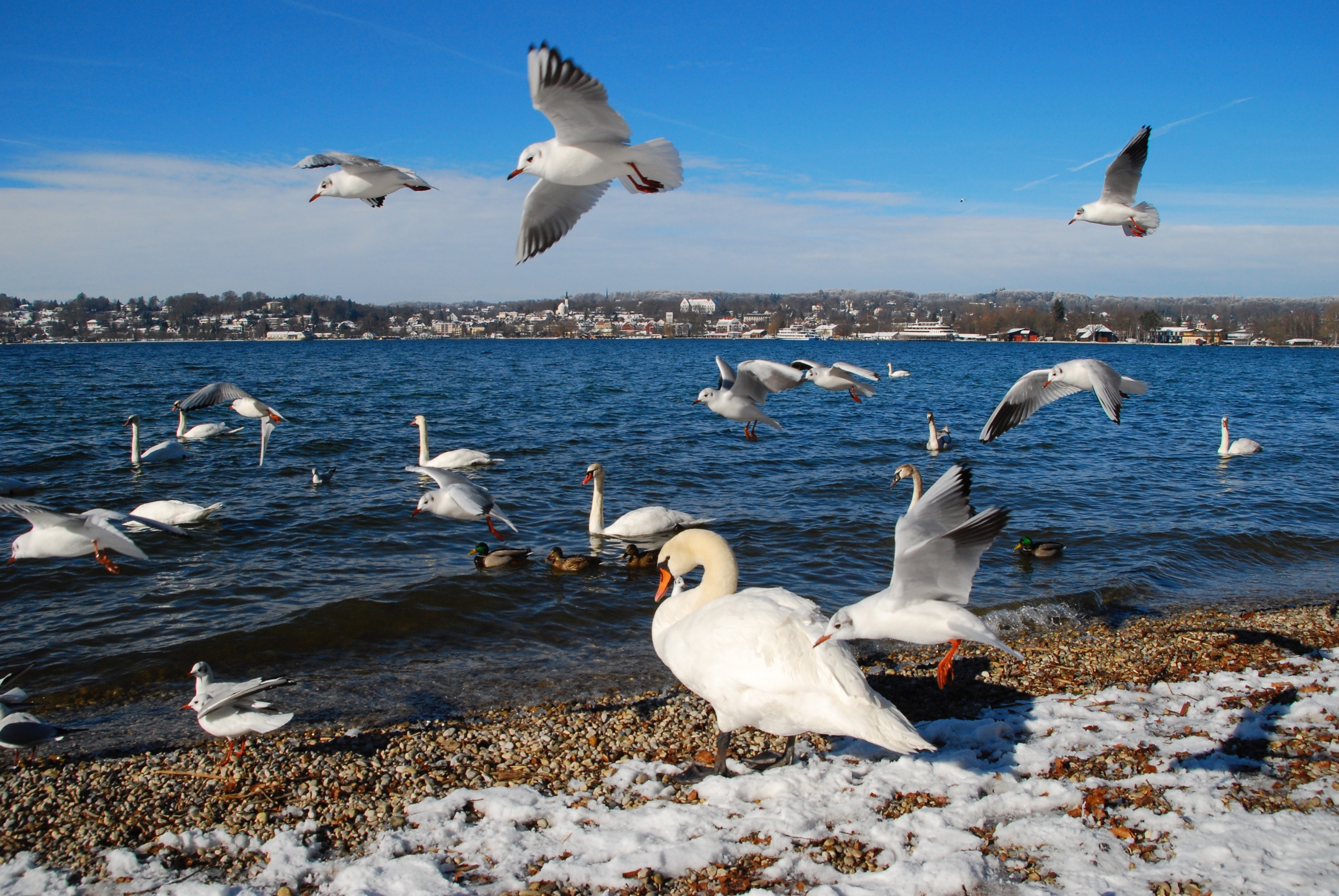 Lachmöwen, Höckerschwäne und Stockenten am Starnberger See. Im Hintergrund die Stadt Starnberg.